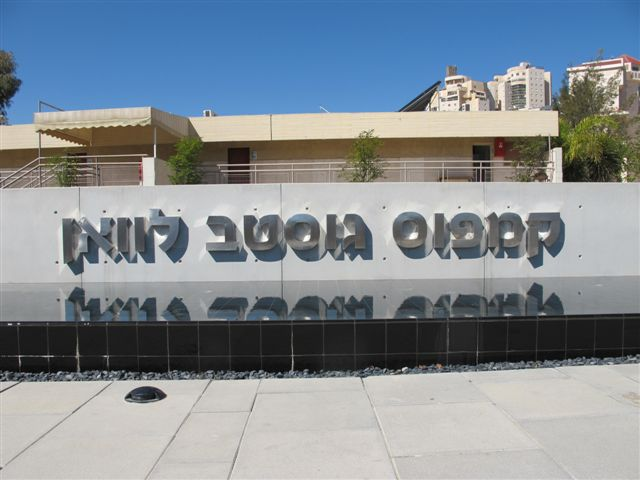 הכניסה החדשה של בית יציב, הנמצא במתחם קמפוס גוסטב לוואן